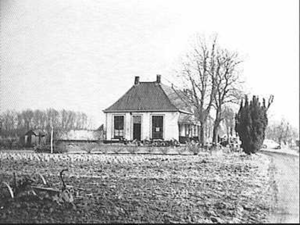 Boedelhof: voorgevel (opmerking: Deze afbeelding hebben wij helaas alleen in deze lage resolutie.)